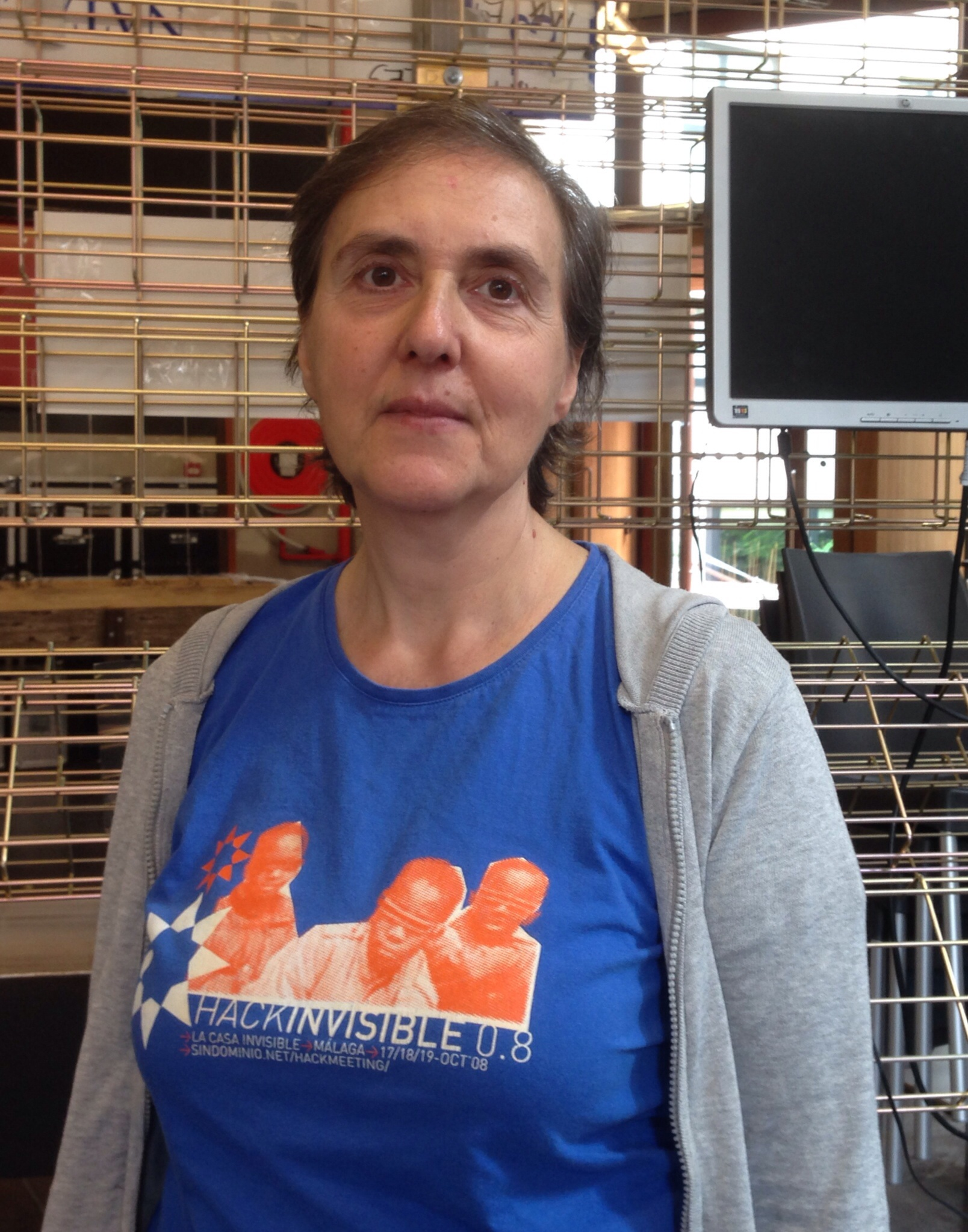 Madrid 2015